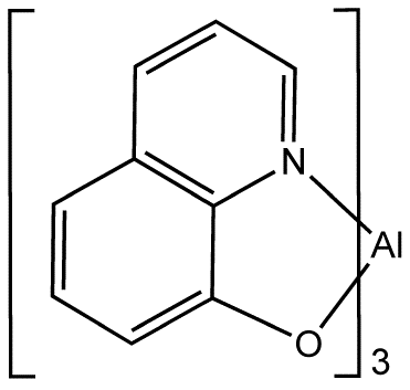 molecule Alq3